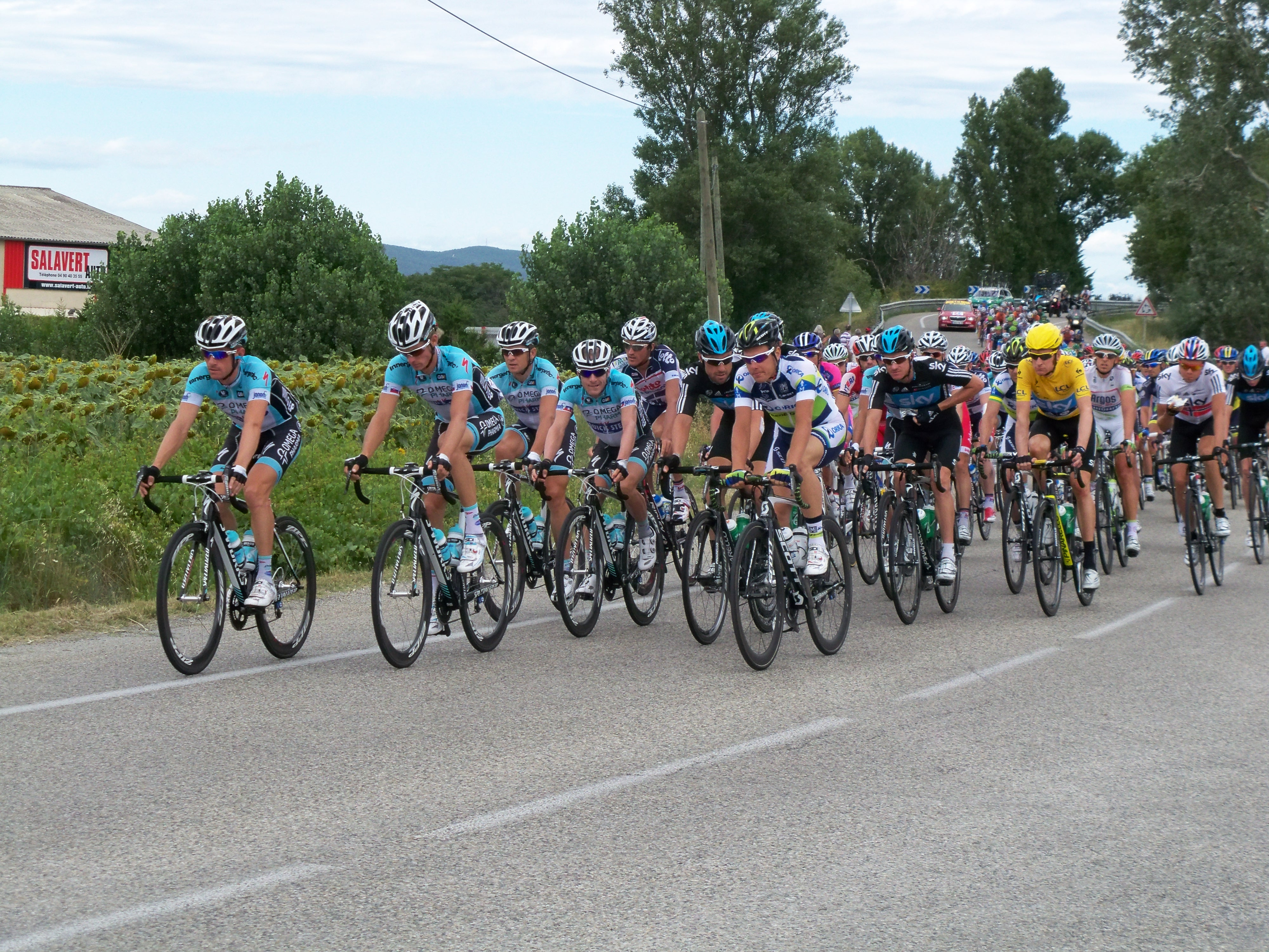 Peloton lors de la 13ème étape, à Lamotte du Rhône (84)